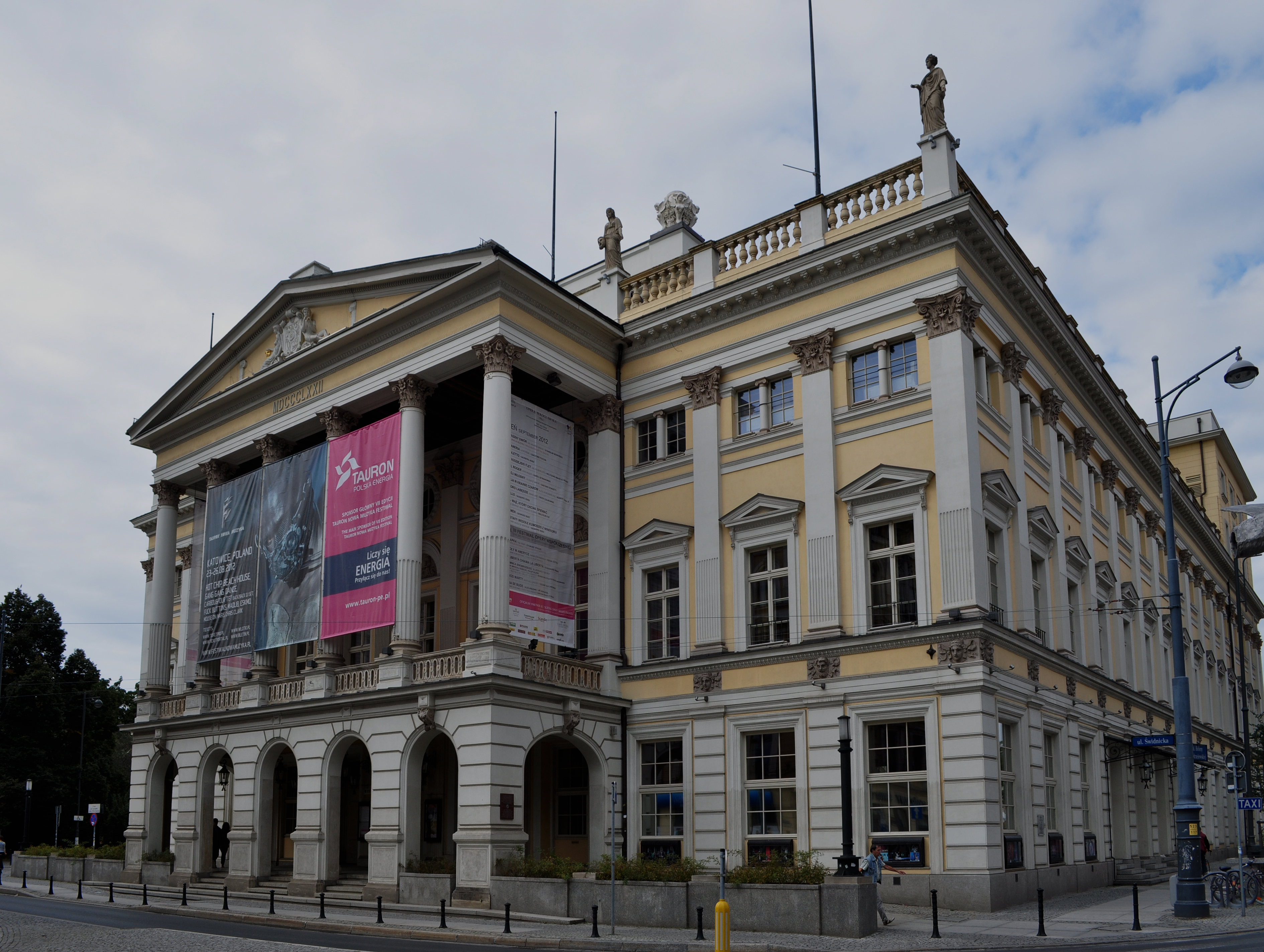 Opera Świdnicka 35, Miasto Wrocław - Stare Miasto